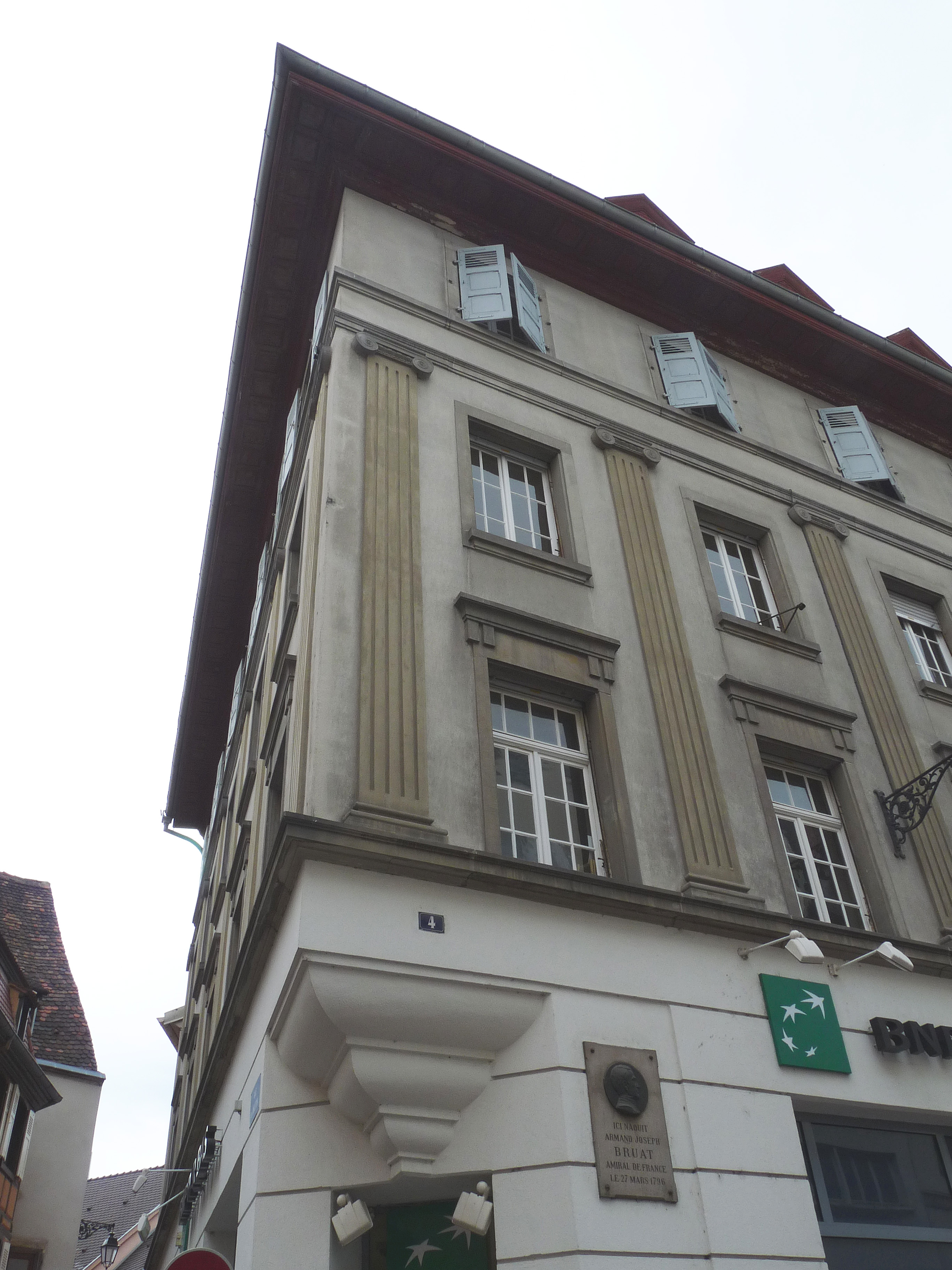 Colmar, 4 Grand-Rue : plaque commémorant la naissance de l'amiral Armand Joseph Bruat. Cet immeuble moderne remplace la maison natale, démolie en 1923.